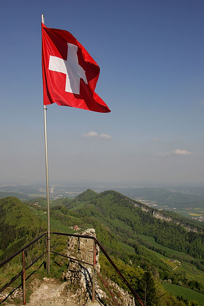 Auf der der Bölchenfluh im Kanton Basel-Landschaft